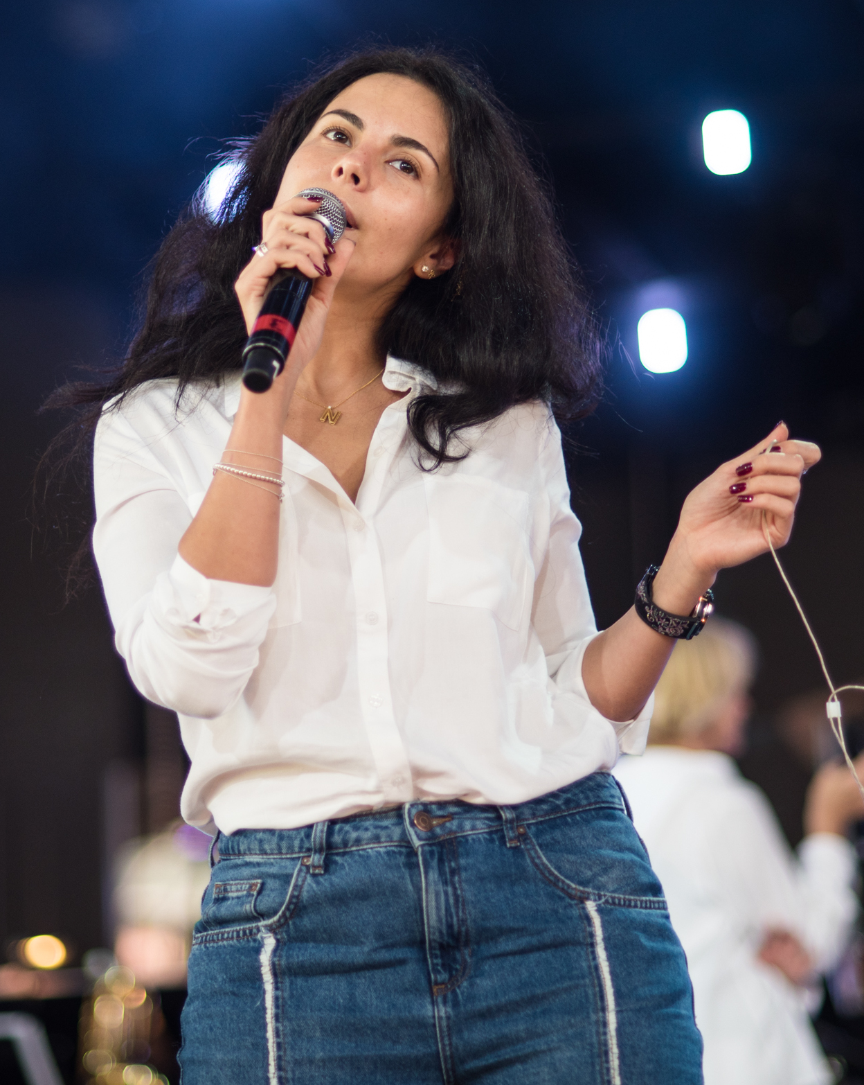 Настя Каменских на фестивале «Лайма. Рандеву. Юрмала 2017»